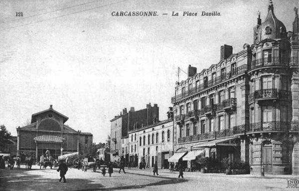 France, Carcassonne (11), Place davilla, Carte postale